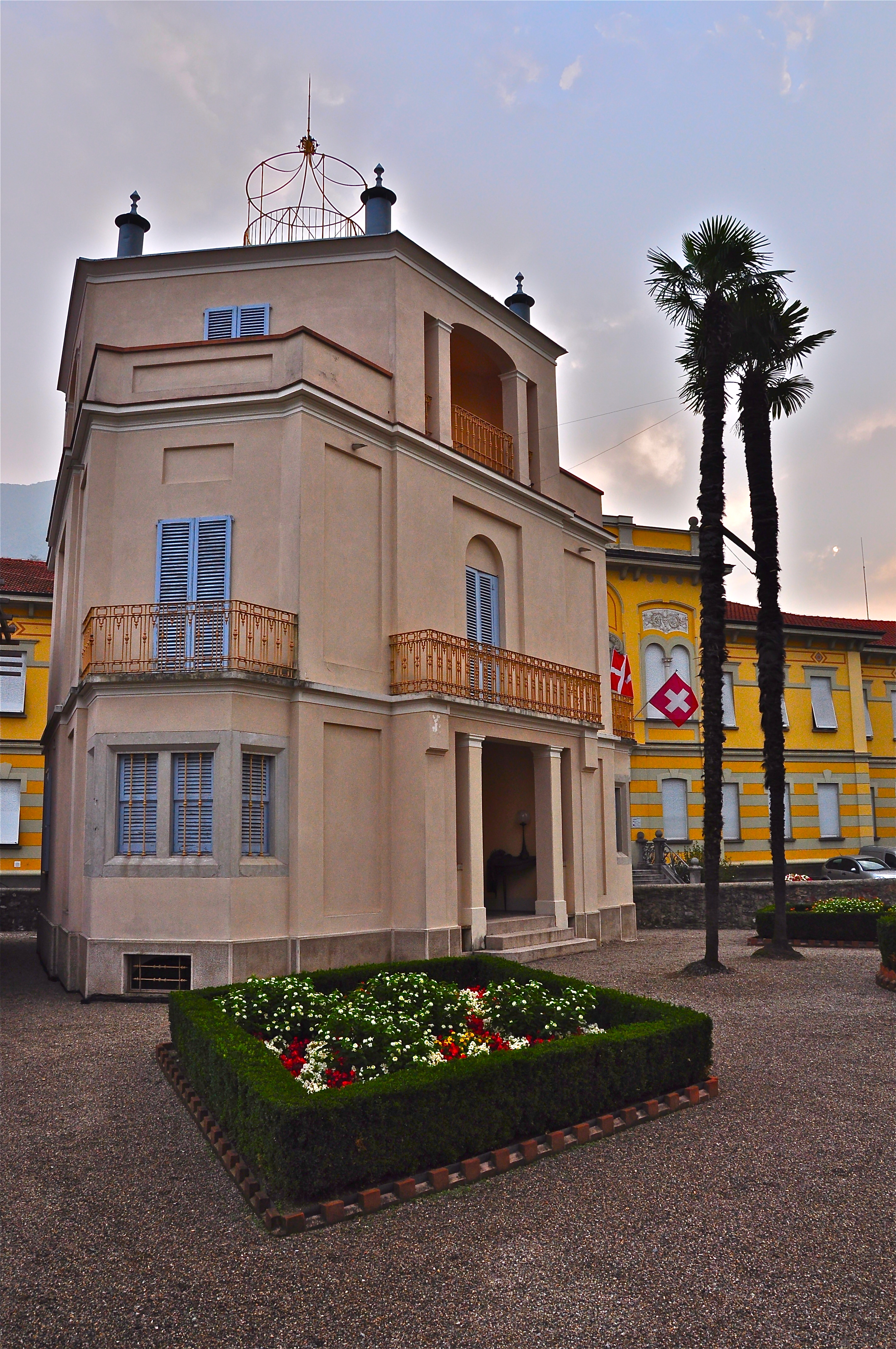 Antonio Croci ritornò a Mendrisio nel 1858, e li costruì la propria abitazione sul pendio soleggiato chiamato Carlasch (ancora oggi si identifica con quel nome)